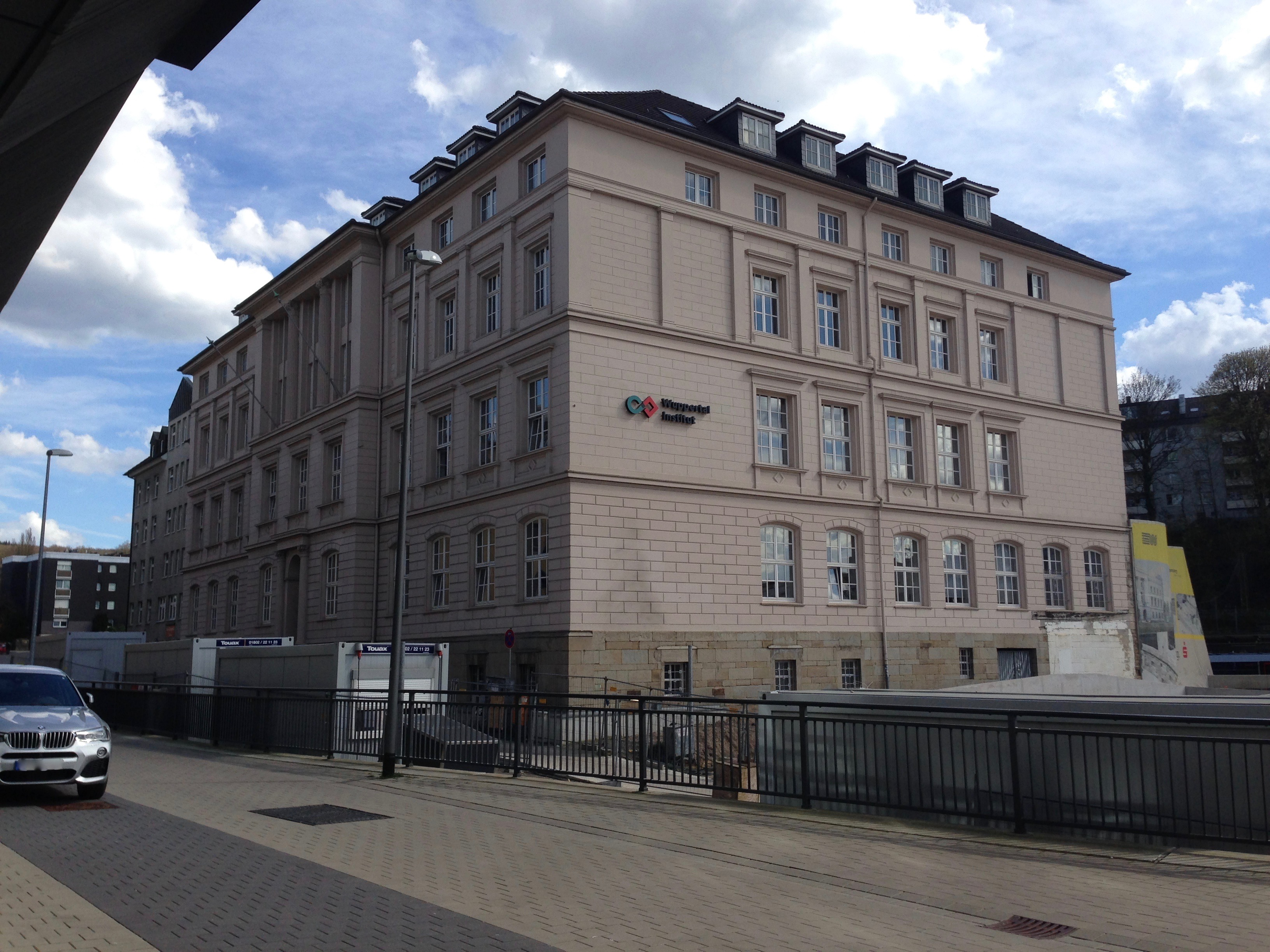 Ansicht des Gebäudes vom Wuppertal Institut während des Döppersberg-Umbaus, April 2016.